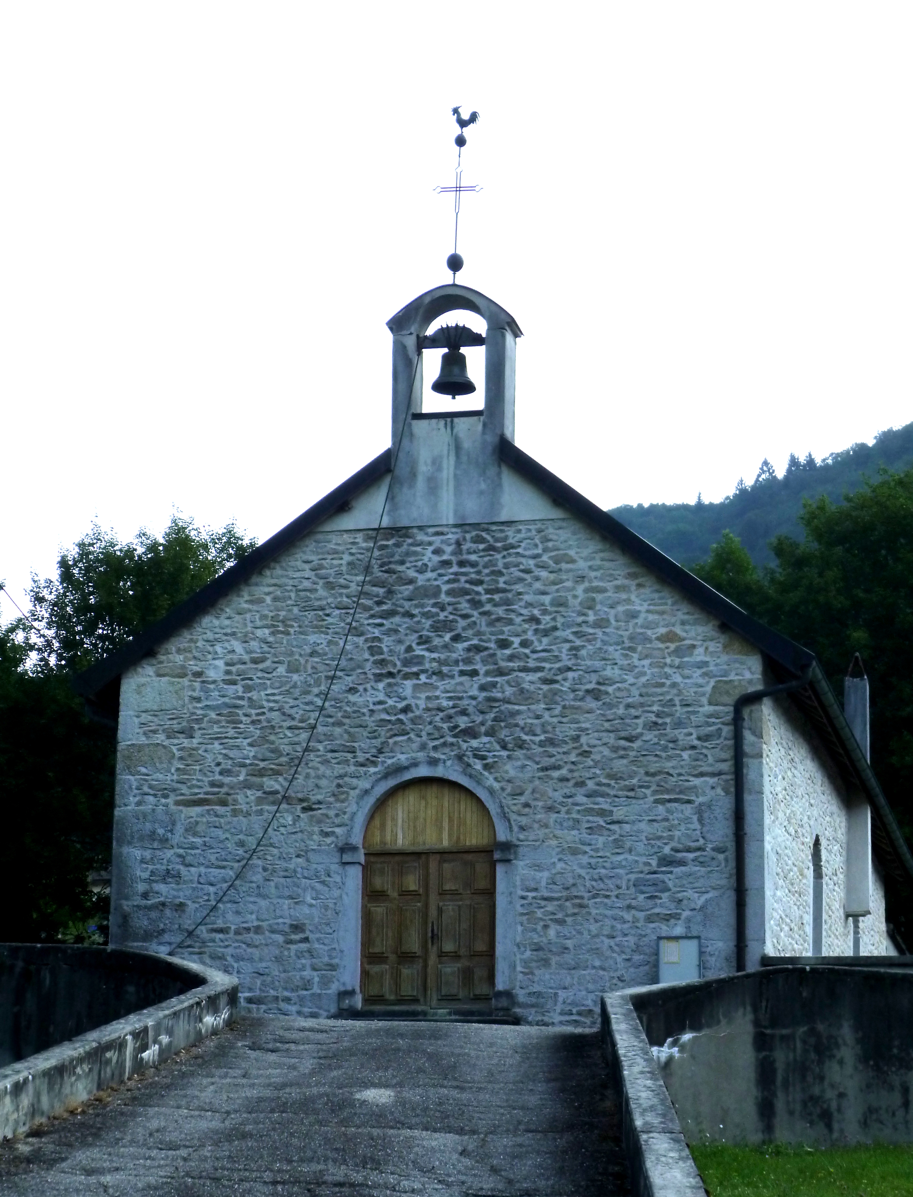 Eglise de Chancia